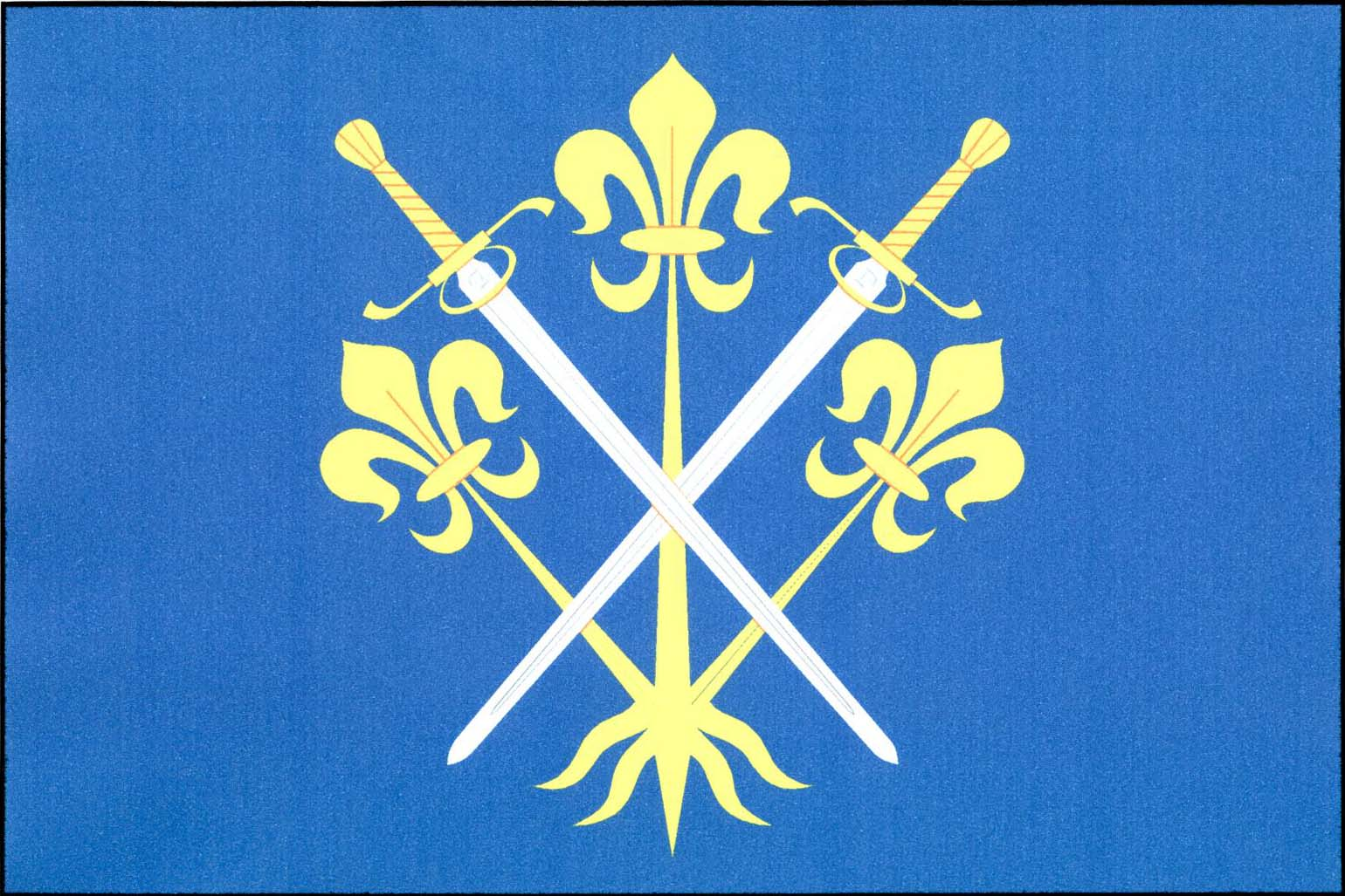 Vlajka obce Radostice